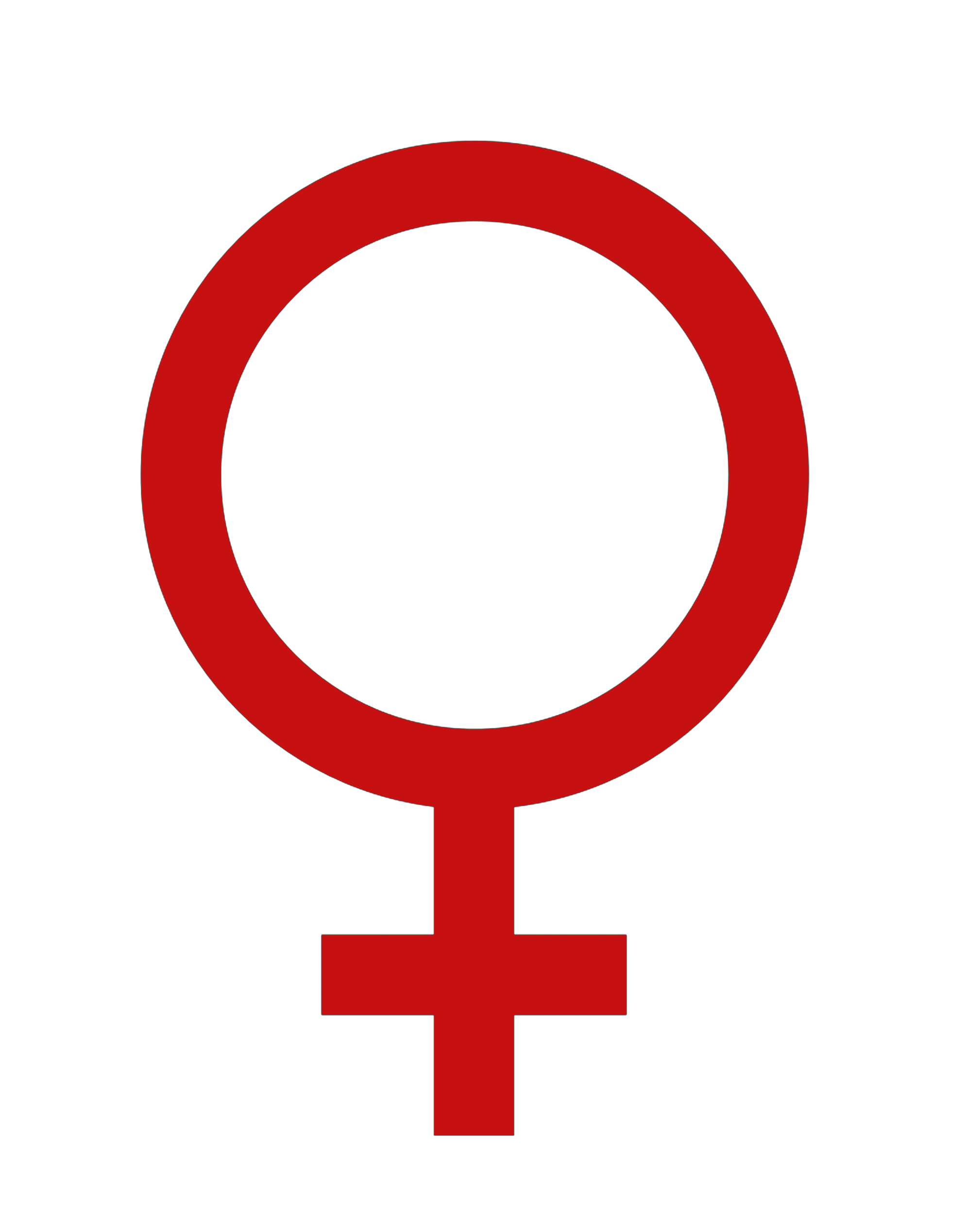 Symbole de la planète Venus et de la Féminité